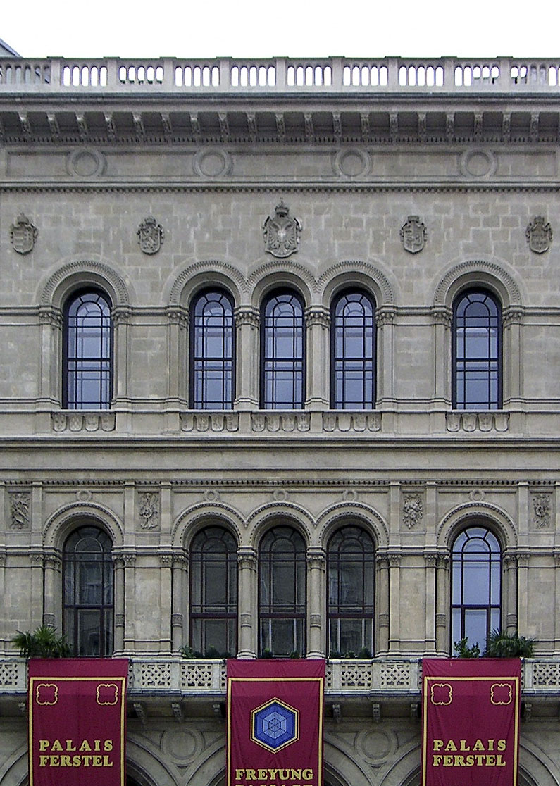 Palais Ferstel, Wien, selbst fotografiert Achtung Name falsch richtig "Palais Ferstel"